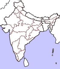 Kartan bygger på resultatet från valet till Lok Sabha april/maj 2004. Gult betyder att partiet lanserat en eller flera kandidater i delstaten, dock utan att vinna mandat. Orange betyder att partiet vunnit mandat från delstaten. Rött betyder att partiet vunnit minst 25% av mandaten från den delstaten och mörkrött 50% eller mer. Kartan tar inte hänsyn till avhopp, partifusioner och fyllnadsval under den ordinarie mandatperiodens gång. Gjord av Soman.